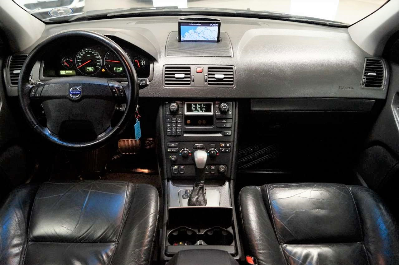 Kabina Volvo XC90 2005 r.